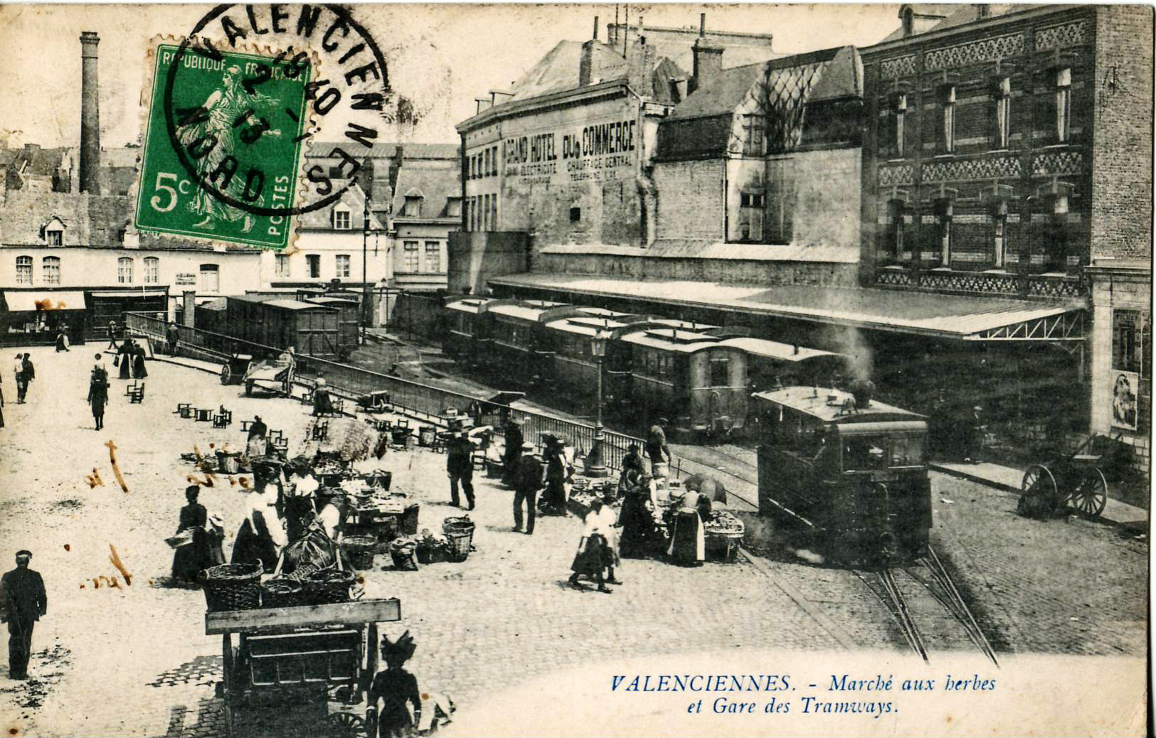 Carte postale ancienne éditée par les Magasins Modernes : VALENCIENNES - Marché aux herbes et gare des Tramways.Il s'agit de la gare centrale de l'ancien tramway de Valenciennes